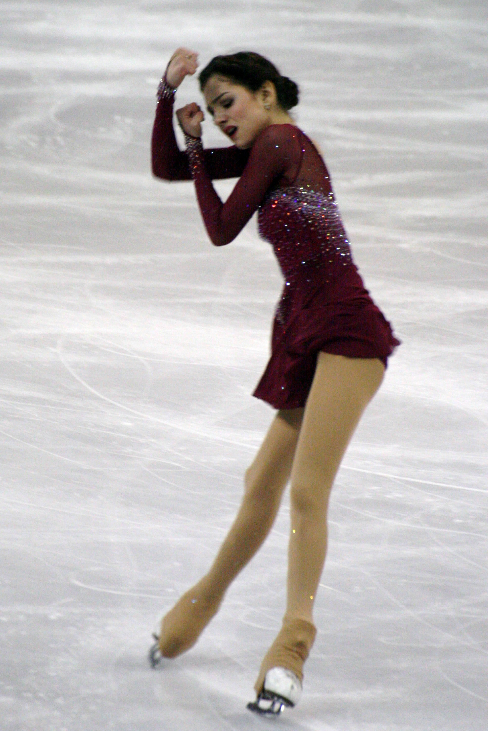 Евгения Медведева (Россия) на финале Гран-при по фигурному катанию 2015-2016.